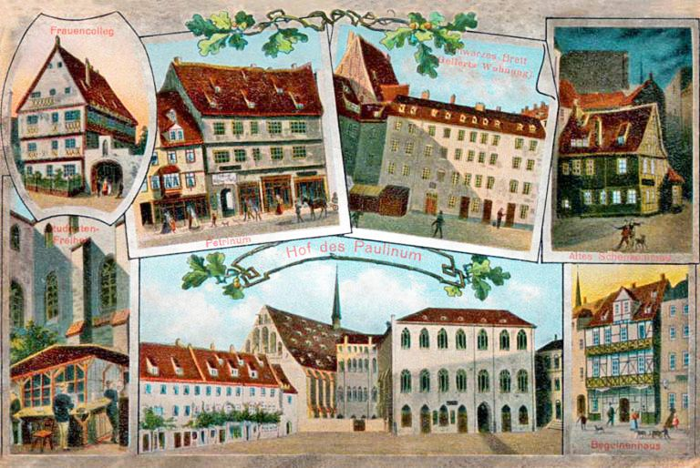 Postkarte mit alten Gebäuden der Universität LeipzigFrauencolleg, Petrinum, Schwarzes Brett, Altes Schenkhaus, Beguinenhaus, Hof des Paulinum, die Studenten-Freiheit